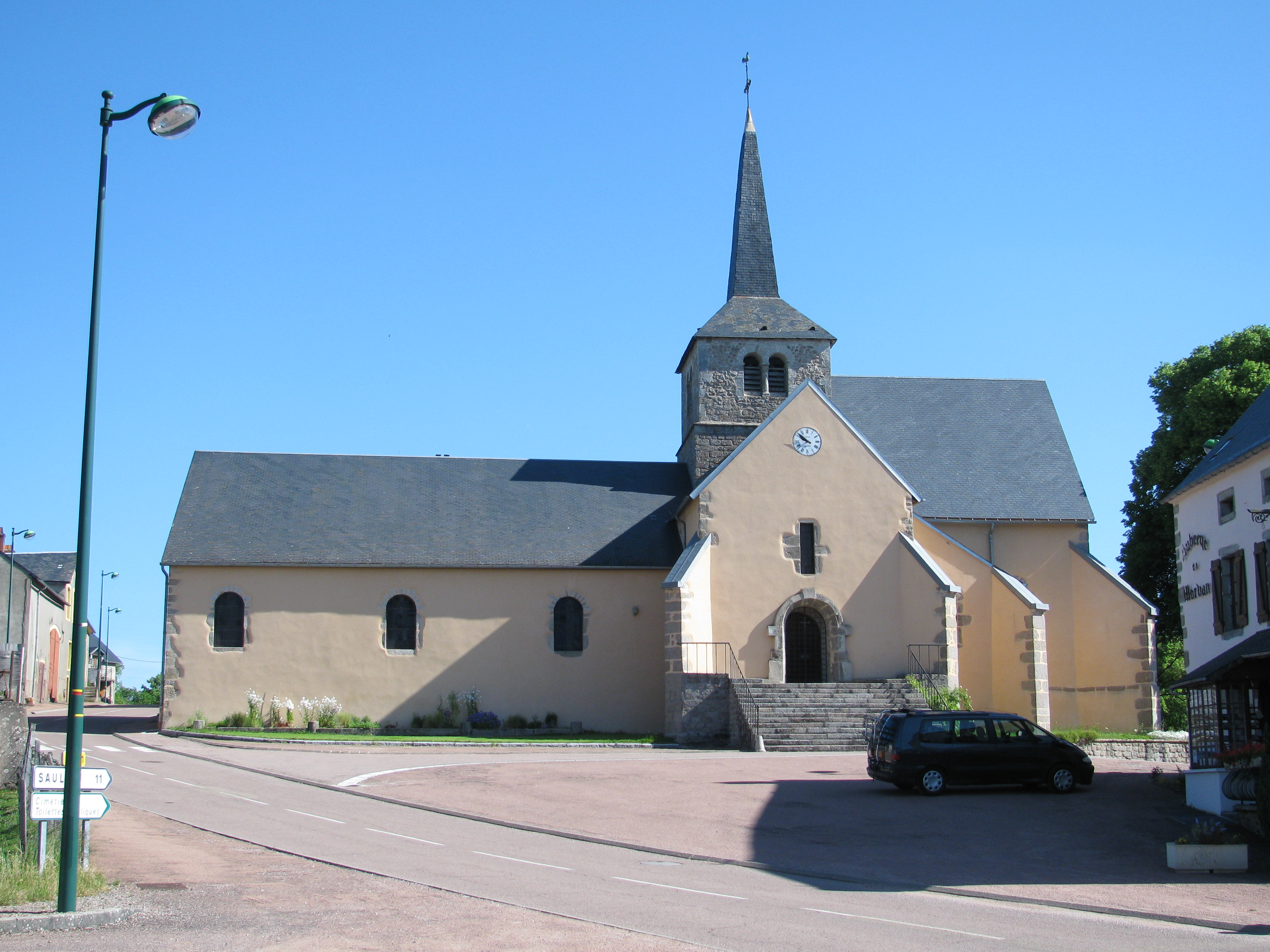 Église Saint-Hilaire d'Alligny-en-Morvan, Nièvre, France.